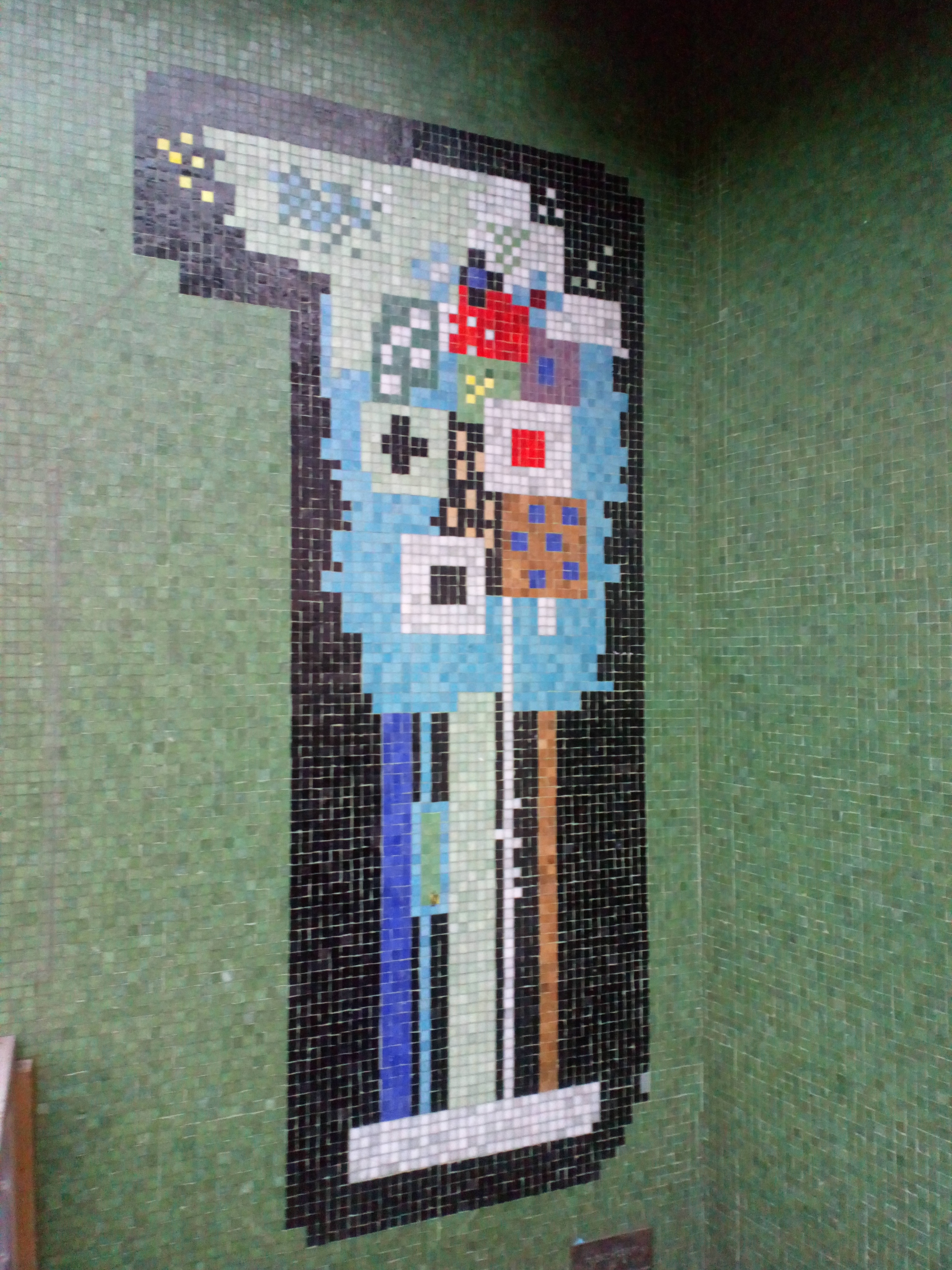 Fasadmosaik, Ejnar Nettelbladt